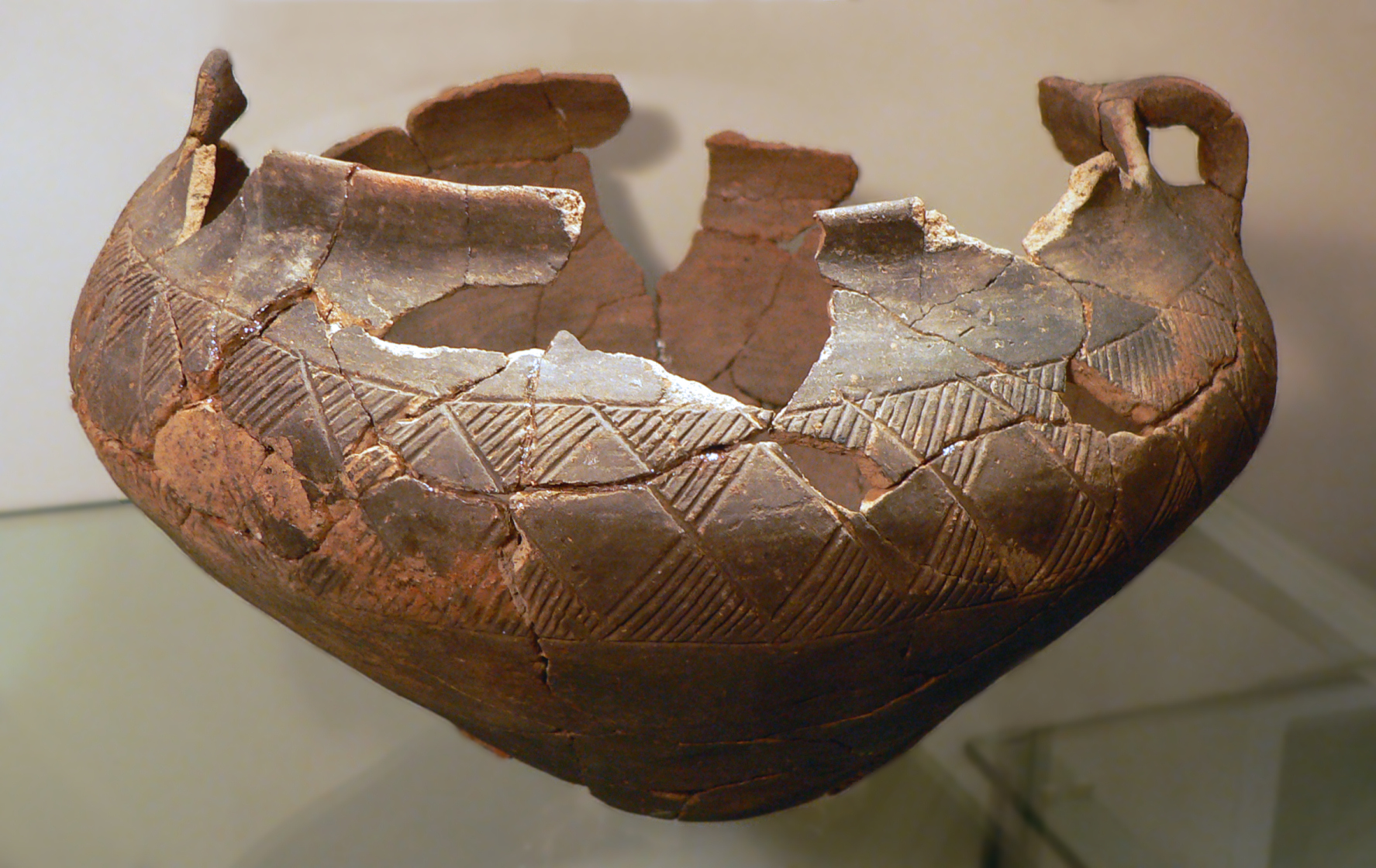 Nienburger Tasse, gefunden bei Hohnhorst auf einem Urnengräberfeld, ausgestellt in der Kirche Hohnhorst.